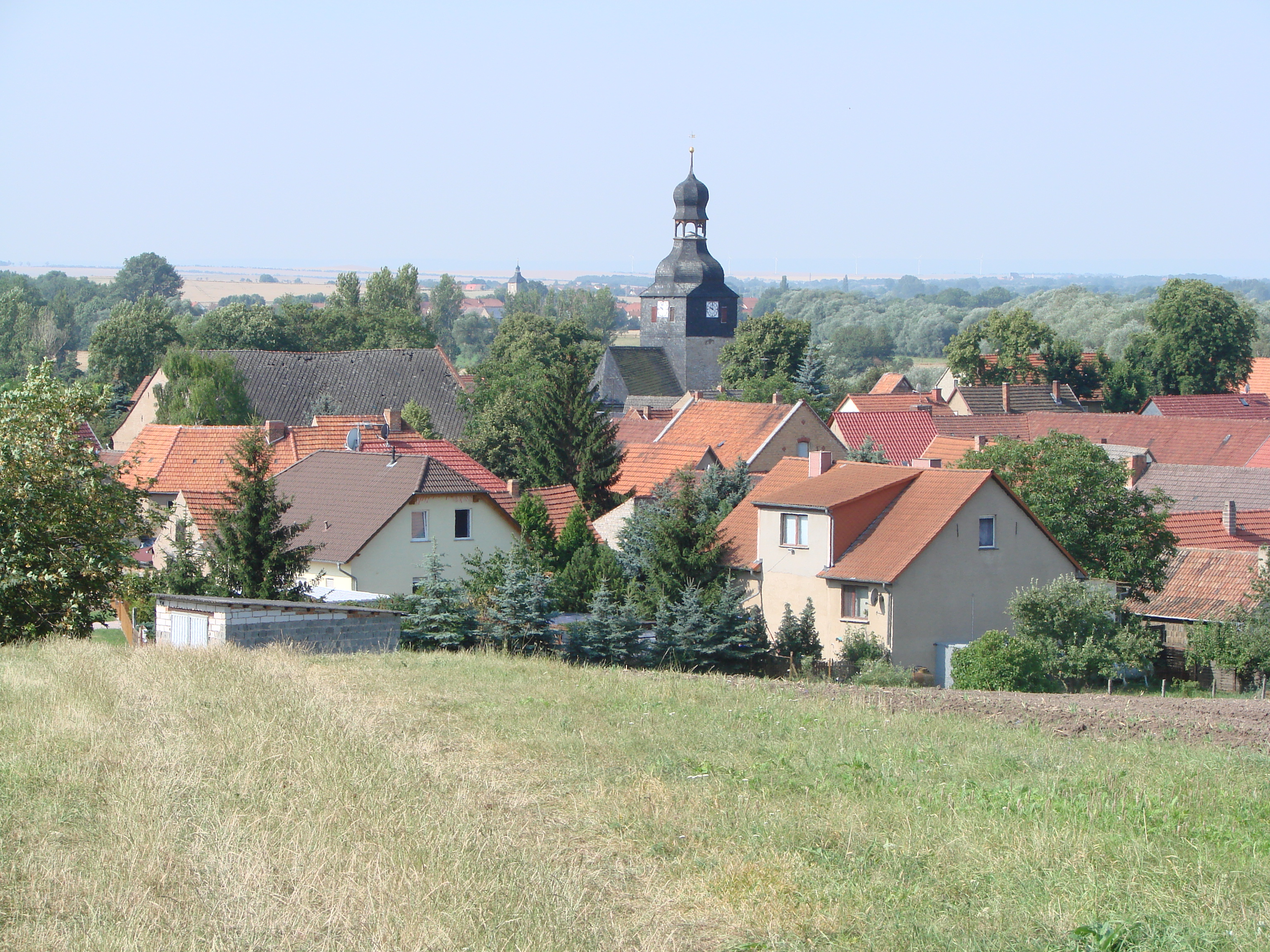 Etzleben